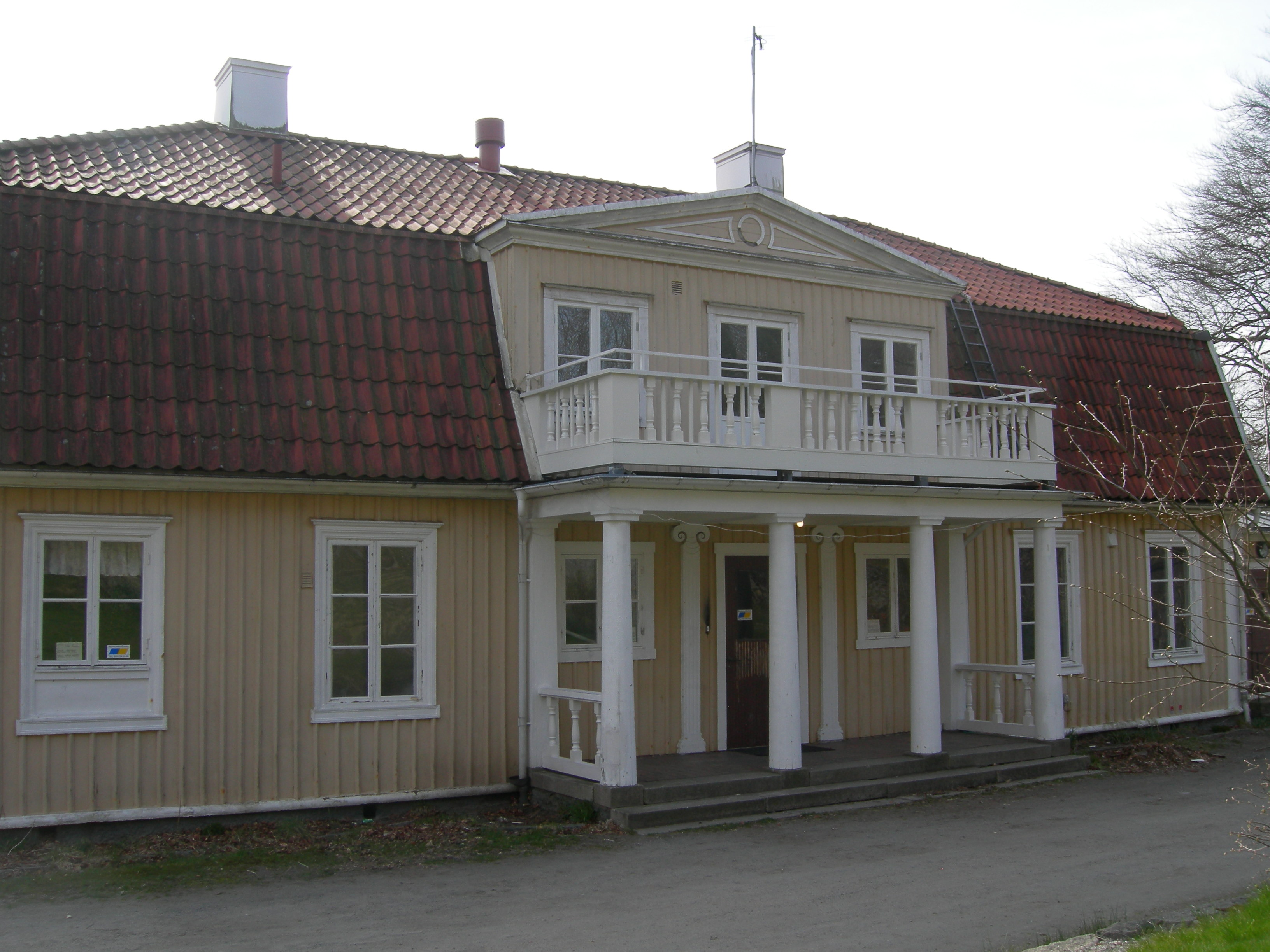 Bergums prästgård, Olofstorp, Bergums socken